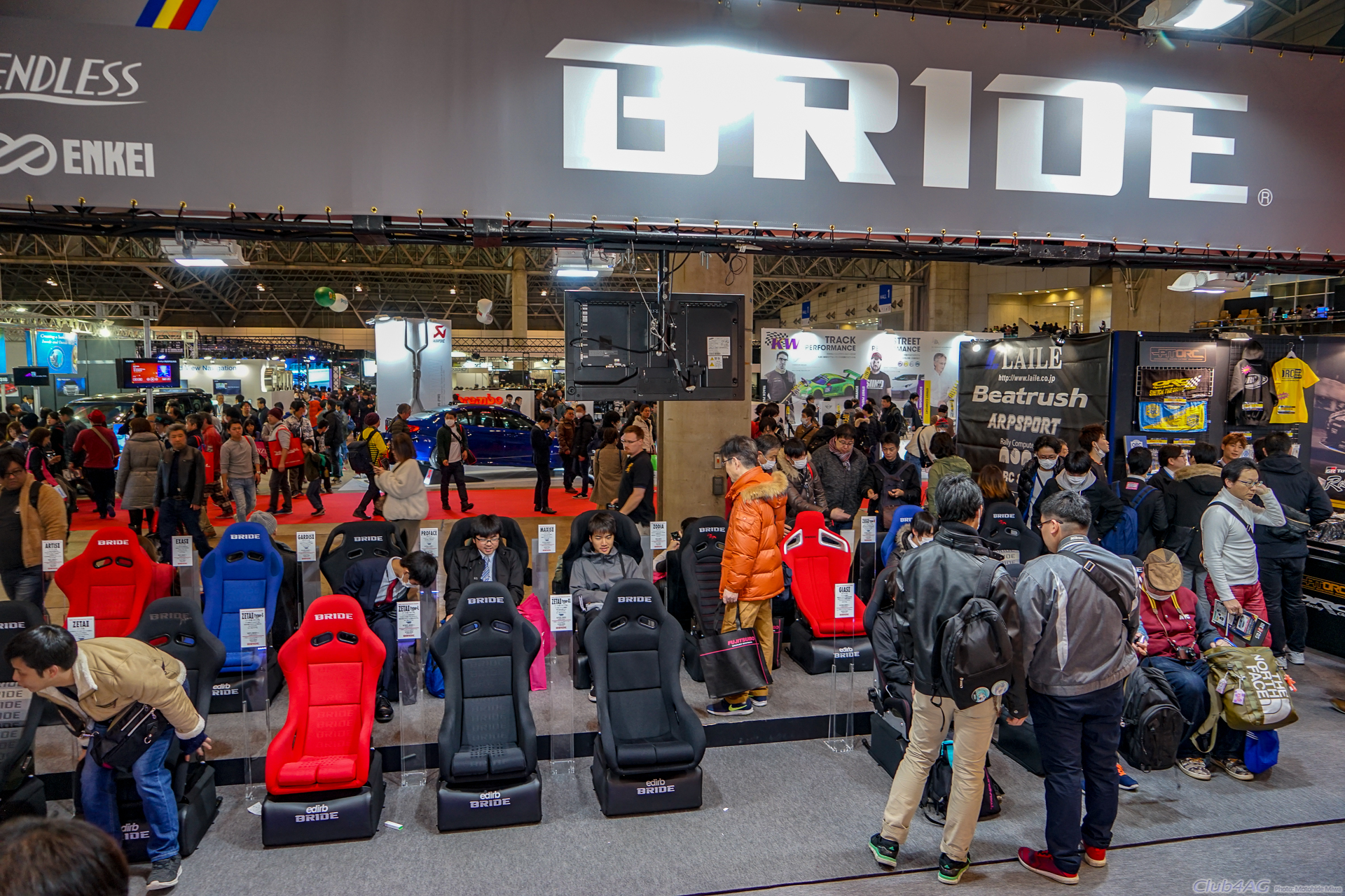 Tokyo Auto Salon 2019